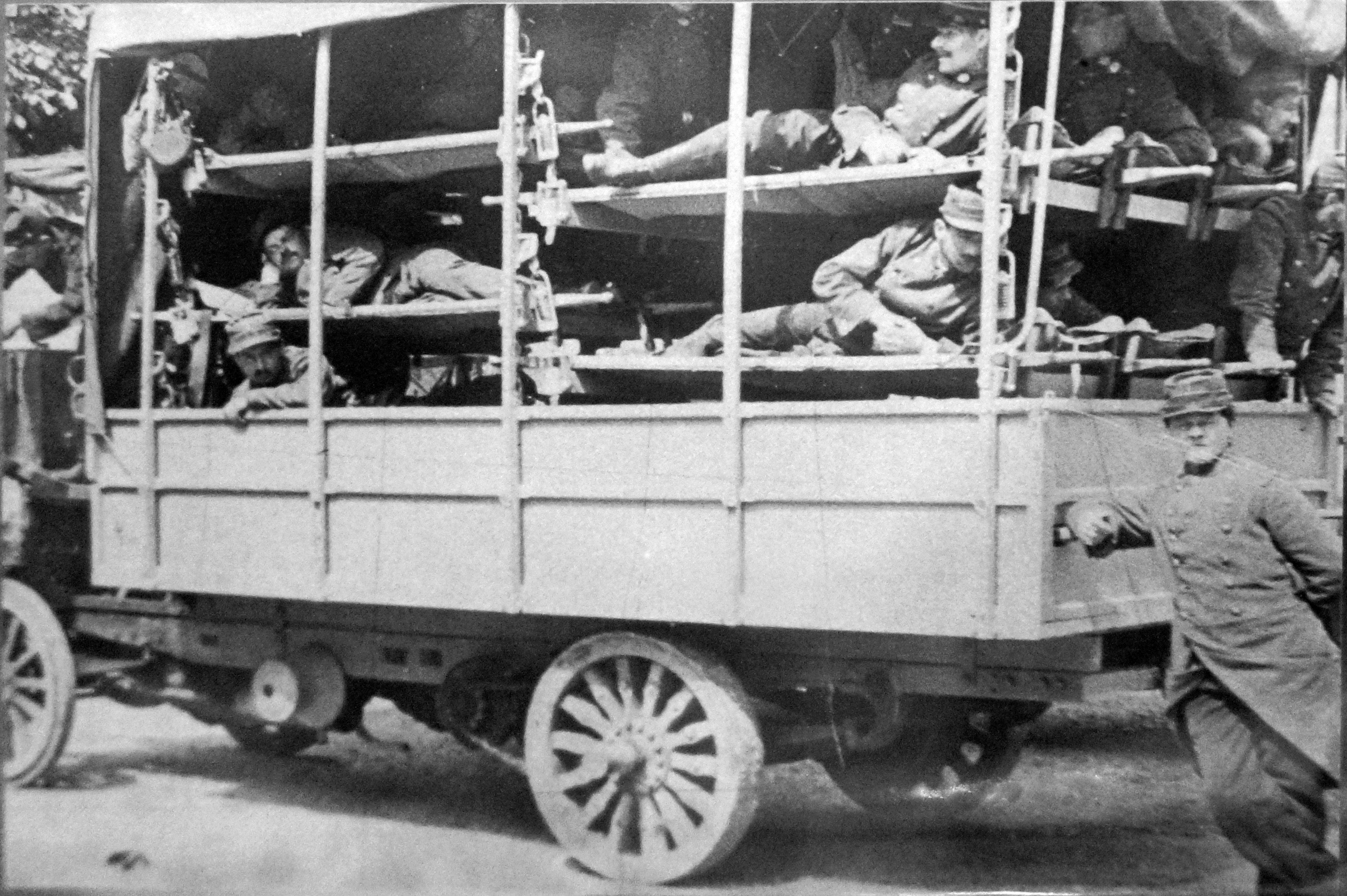 lors de l'exposition : Vitry ville hôpital 1914 2014.